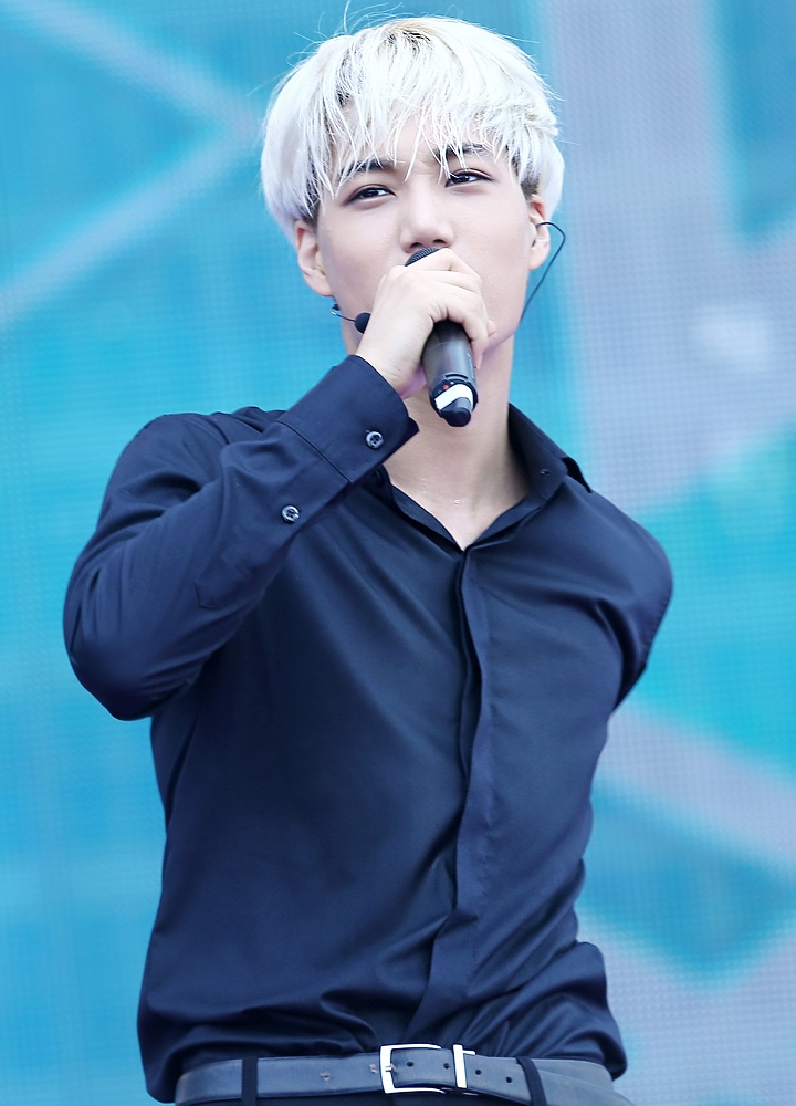 Kai at the Hong Kong Dome Festival on July 1, 2014.